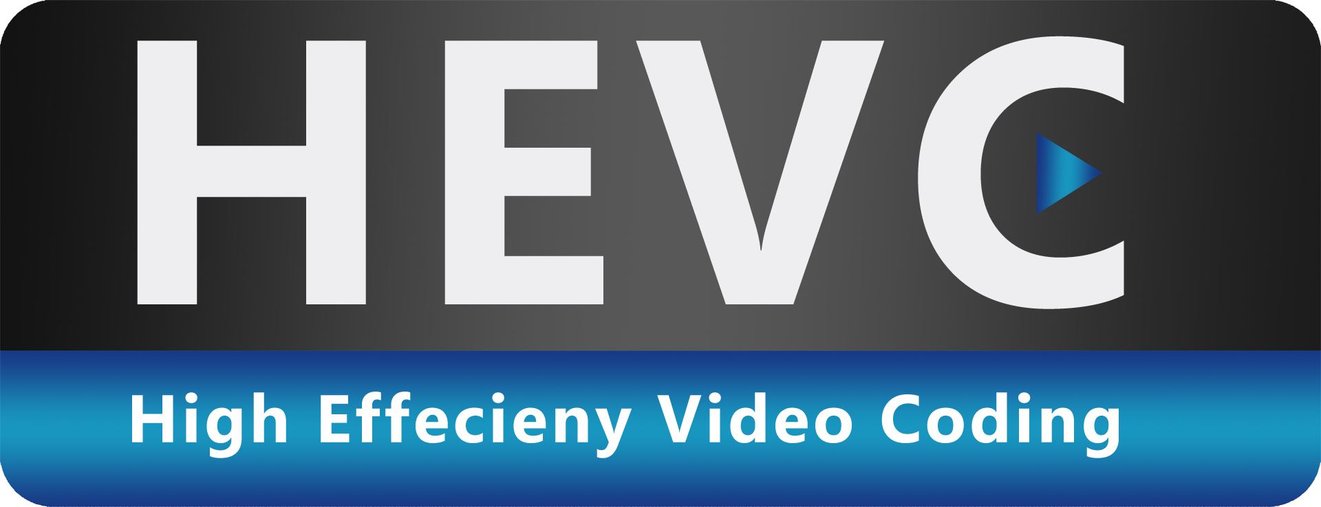 סמל התקן HEVC